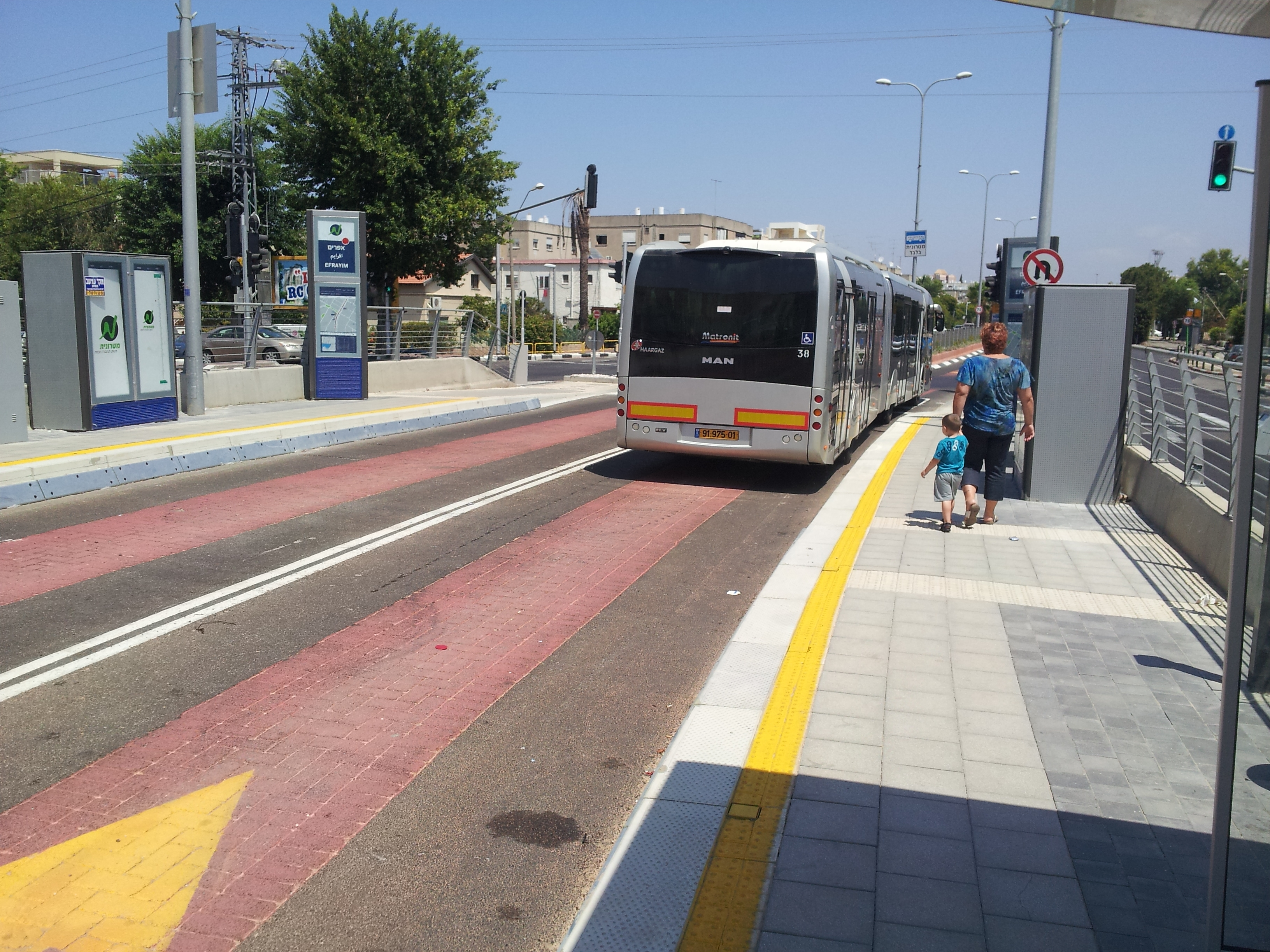 מטרונית בקו מספר 1